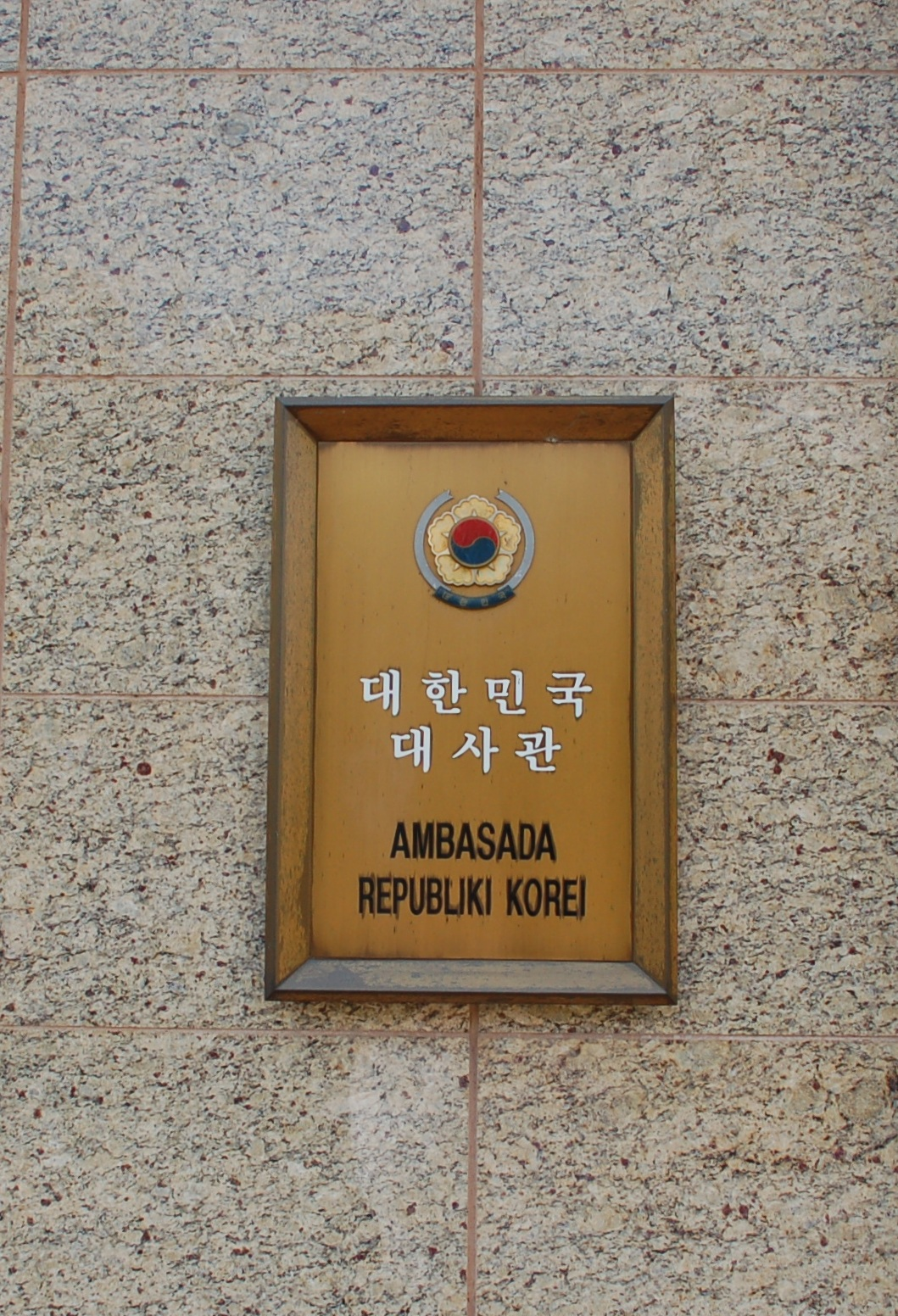 Botschaft Korea Warschau